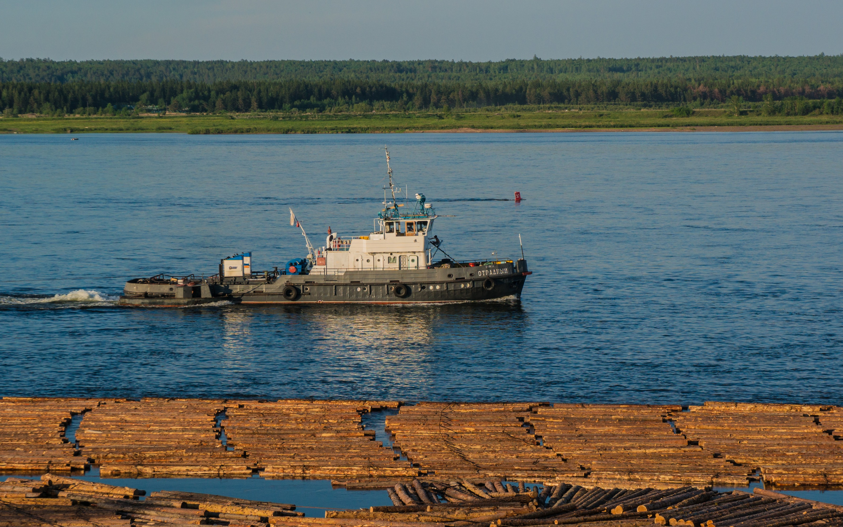 Лесосплав на Енисее в районе г. Лесосибирска